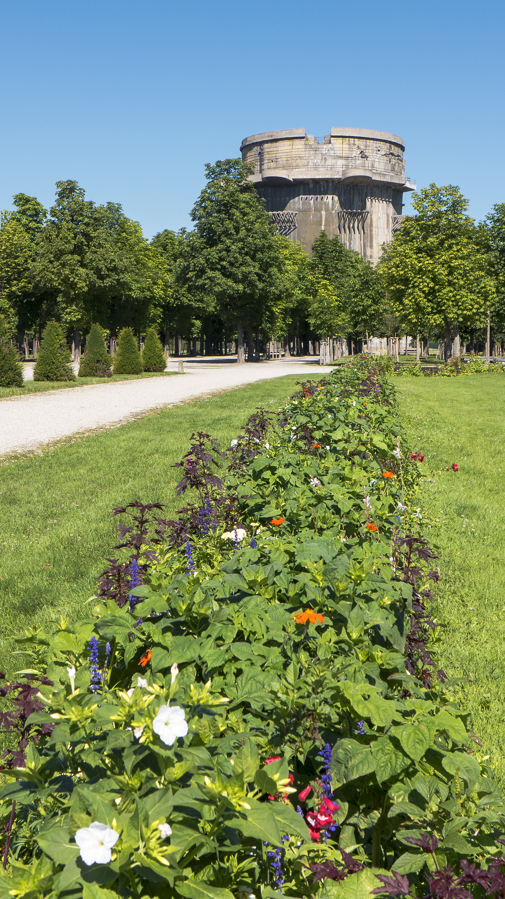 Augarten in Wien 2